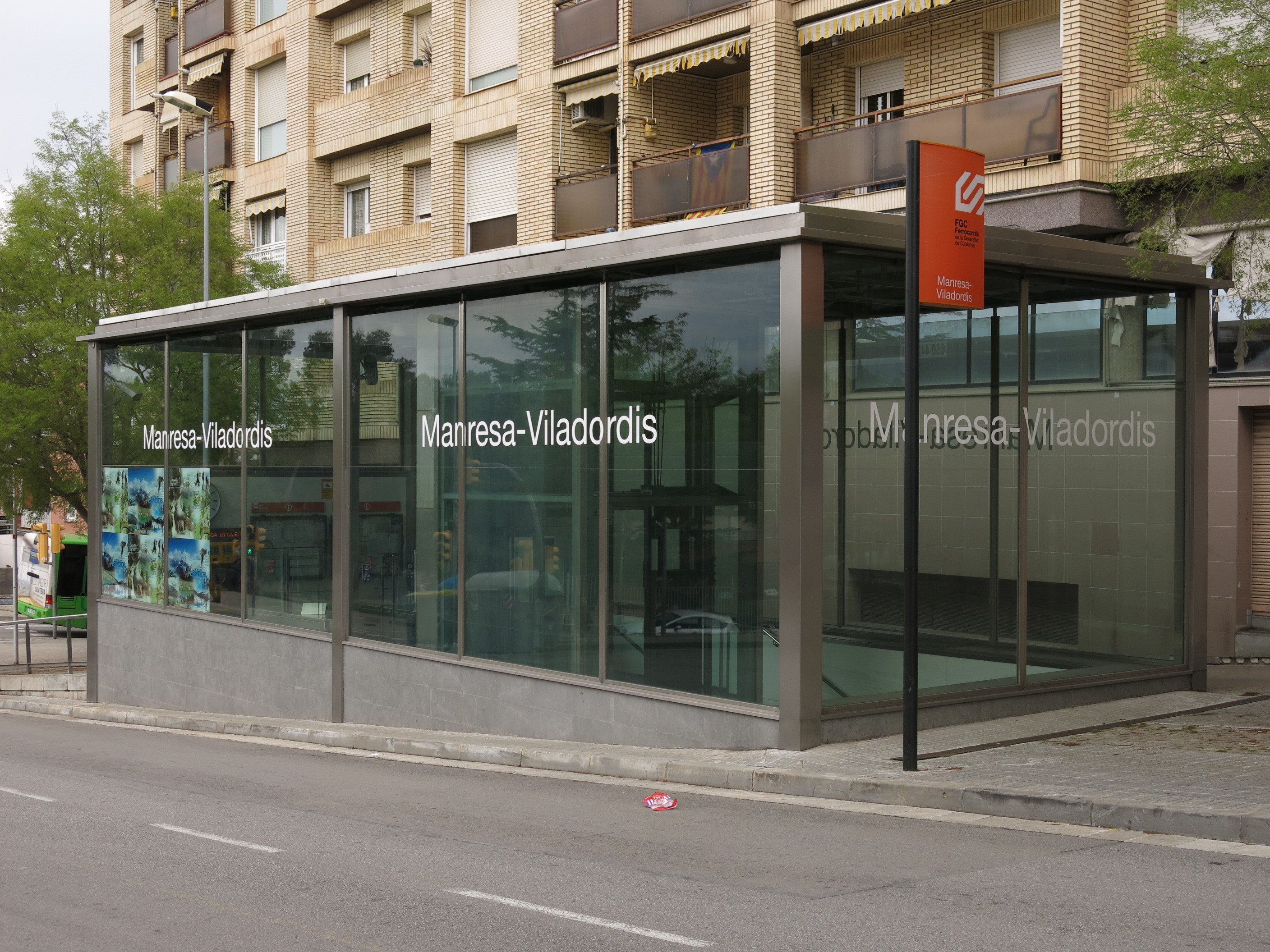 Estació dels FGC de Manresa-Viladordis, av. Francesc Macià (Manresa, Bages).